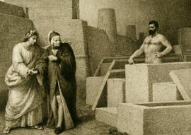 Farinata degli Uberti